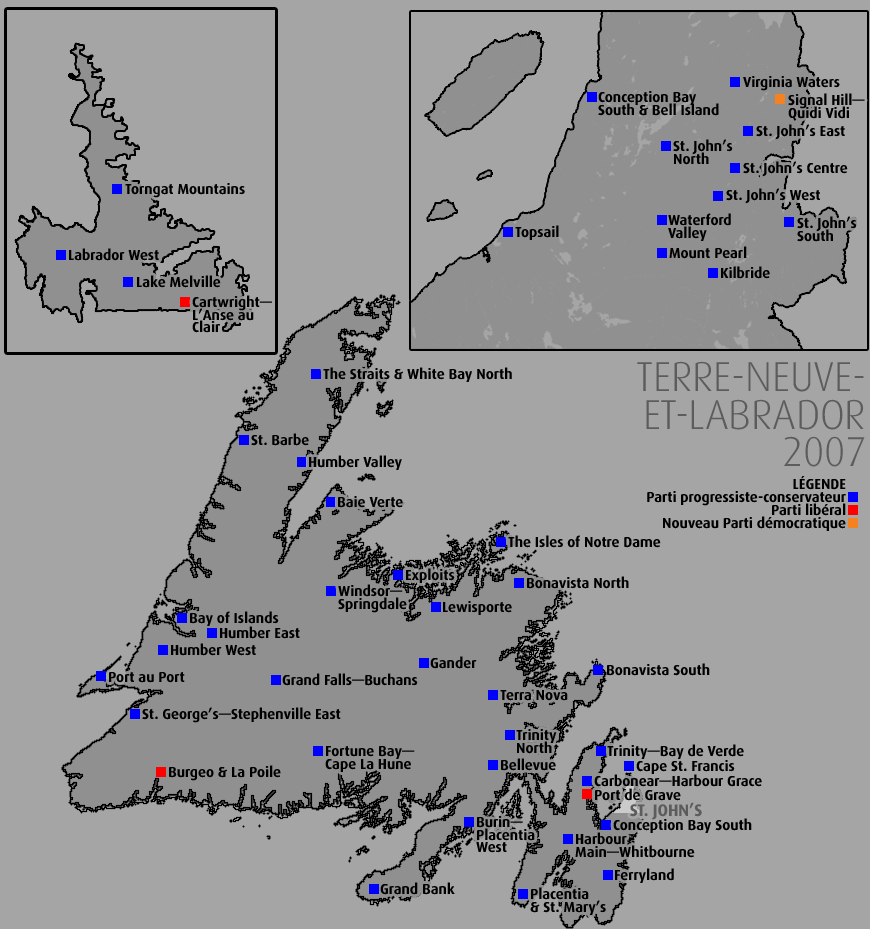 Carte de resultats par circonscription dans l'élection terre-neuvienne, 2007. Version alternative : image:nl_elections_2007.png (English).